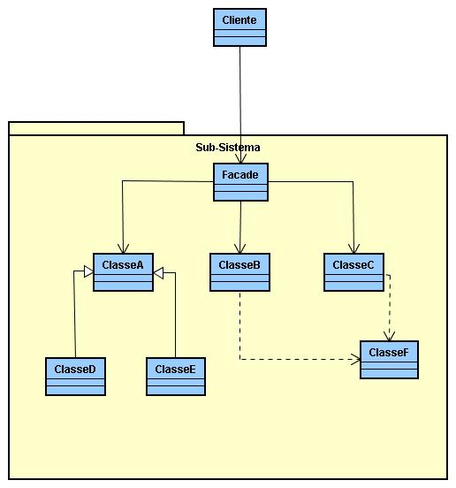 Fig.3 Outro exemplos de estrutura do Padrão Facade.